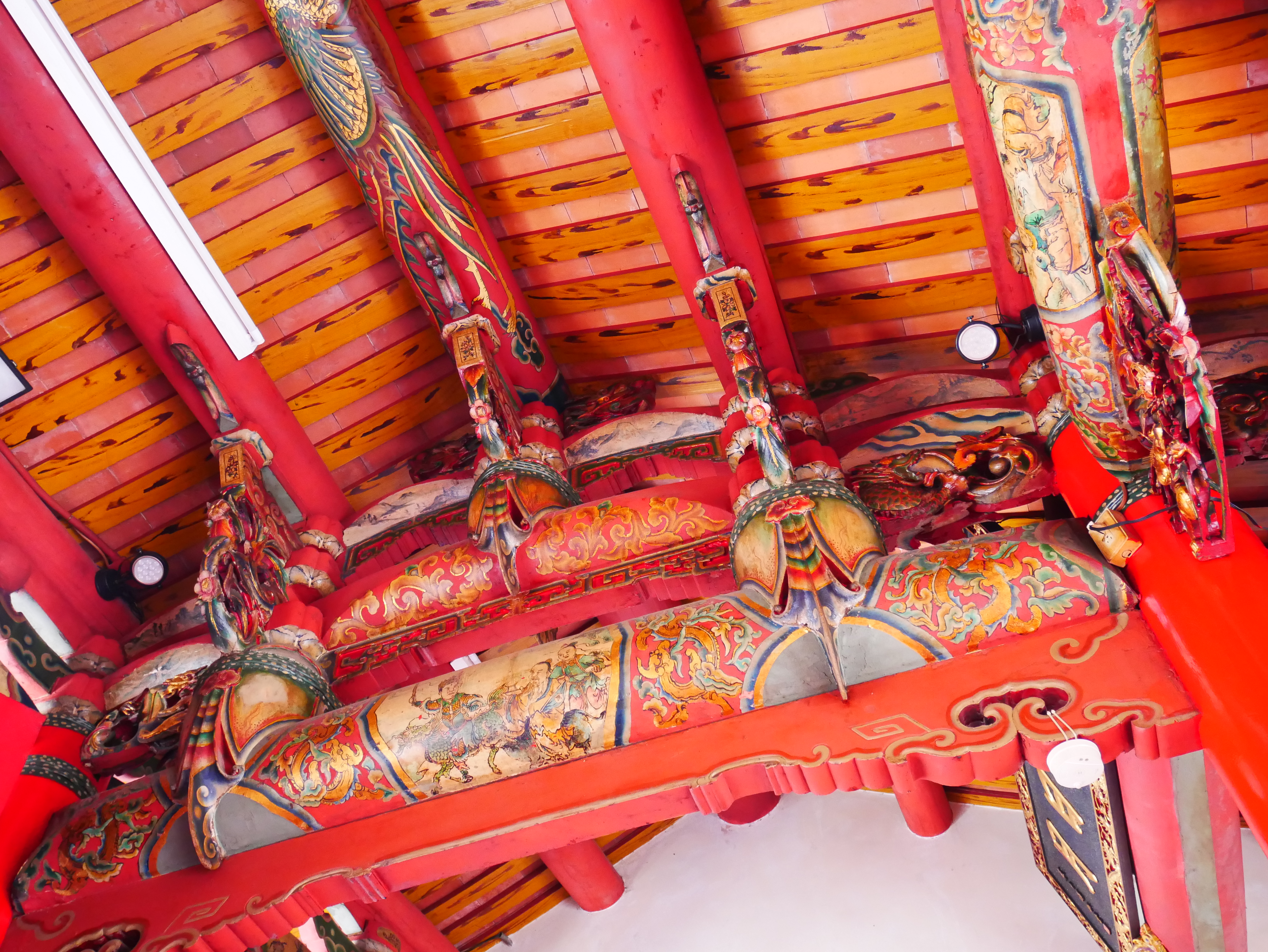 中文（台灣）: 新竹關帝廟抬梁式棟架，新竹市東區南門聯里關帝里